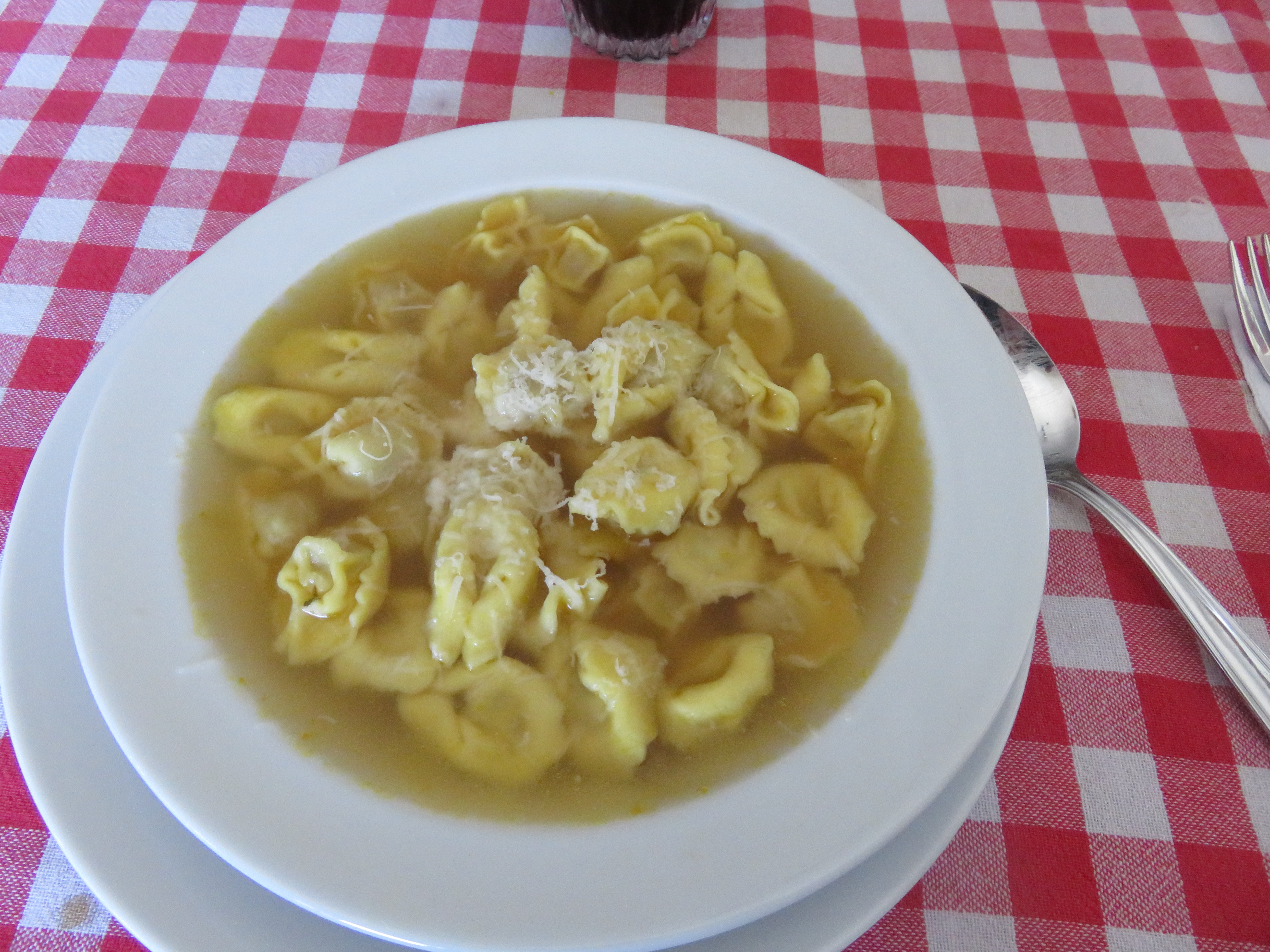 Cappelletti ferraresi (abbondanti) in brodo di manzo con Parmigiano Reggiano